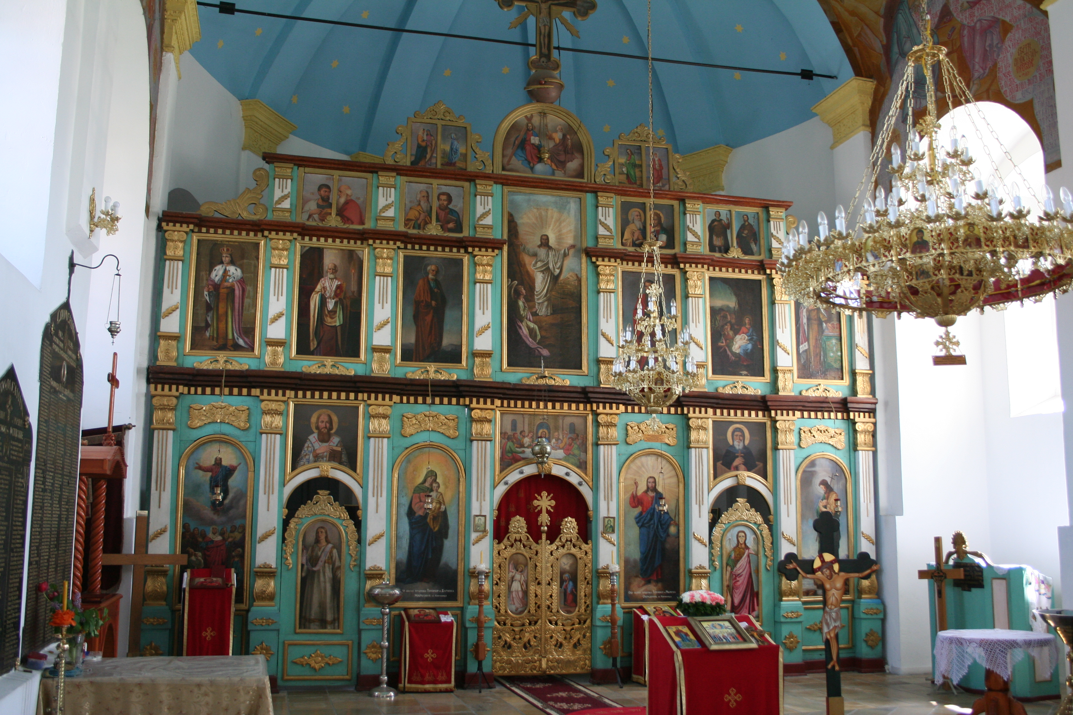 Crkva Vaznesenja Hristovog, Mionica